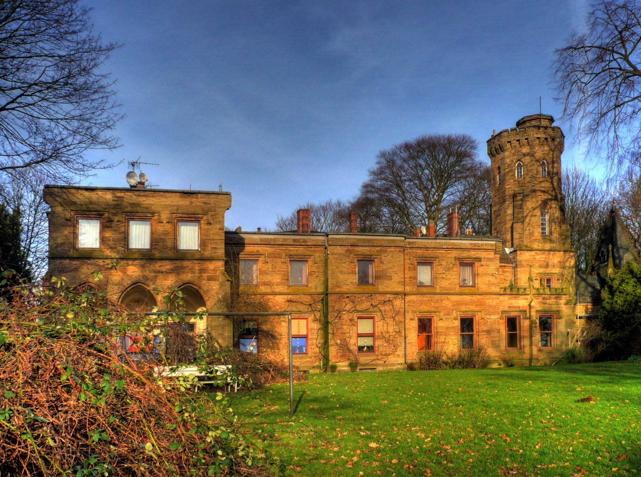 Waetjens Schloss Bremen-Blumenthal. Das abgebildete Objekt ist ein geschütztes Kulturdenkmal in der Freien Hansestadt Bremen, mit der Nr. 1290 beim Landesamt für Denkmalpflege registriert.